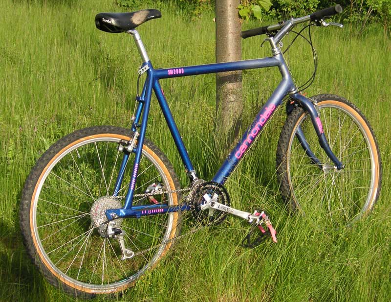 Unmodified Cannondale SM 2000 from 1991